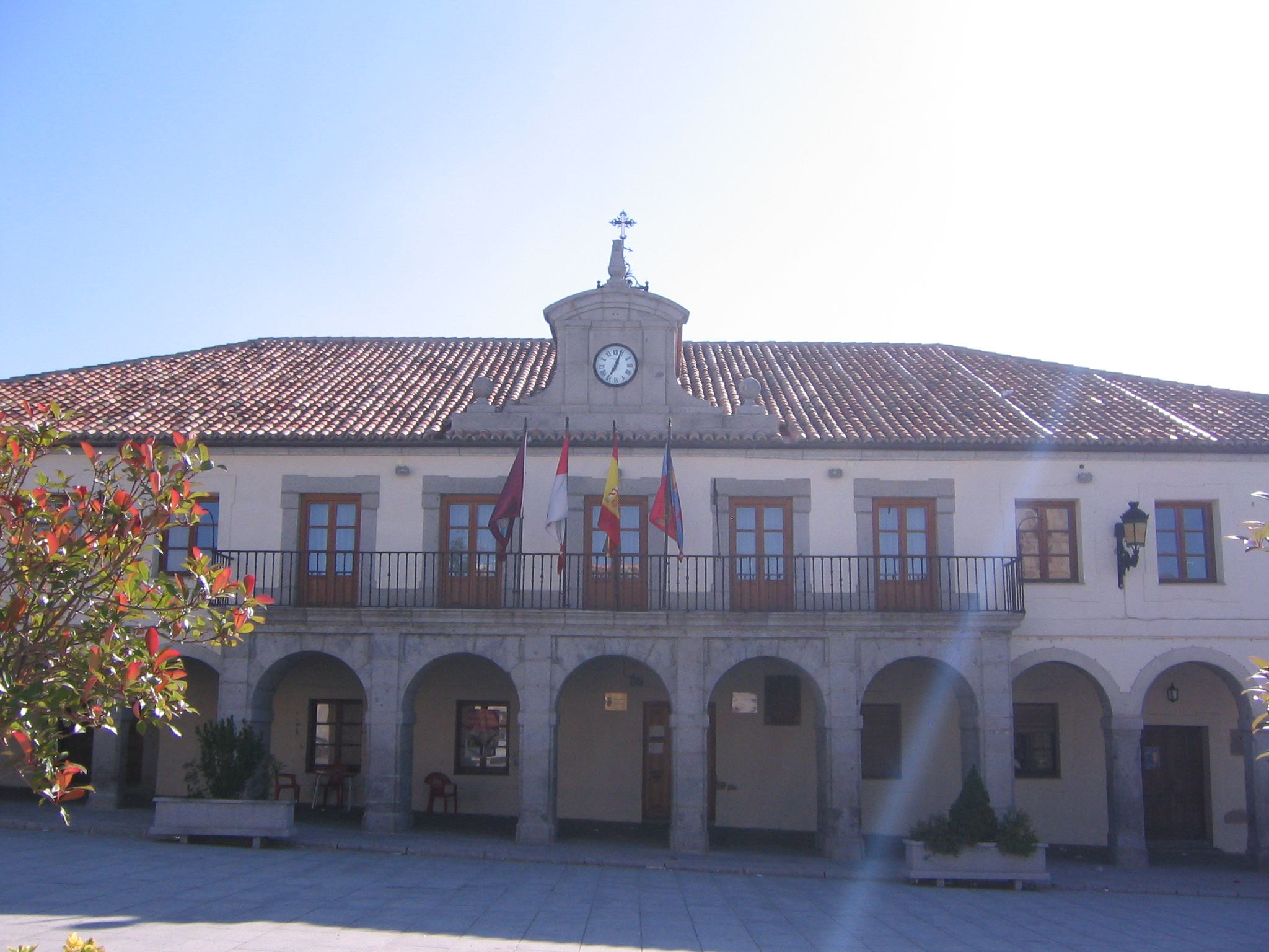 Casa consistorial de Villacastín, Segovia (España)